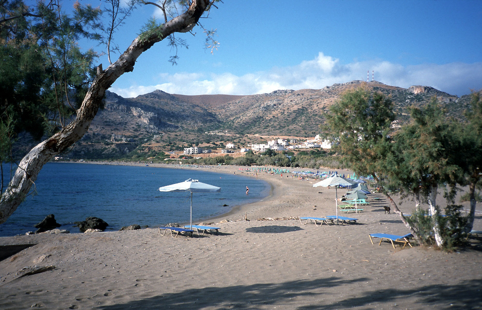 Bildbeschreibung: Paleochora - beach Quelle: photographed by me Fotograf/Zeichner: Apeto Datum: Autumn 2000 Sonstiges: ...